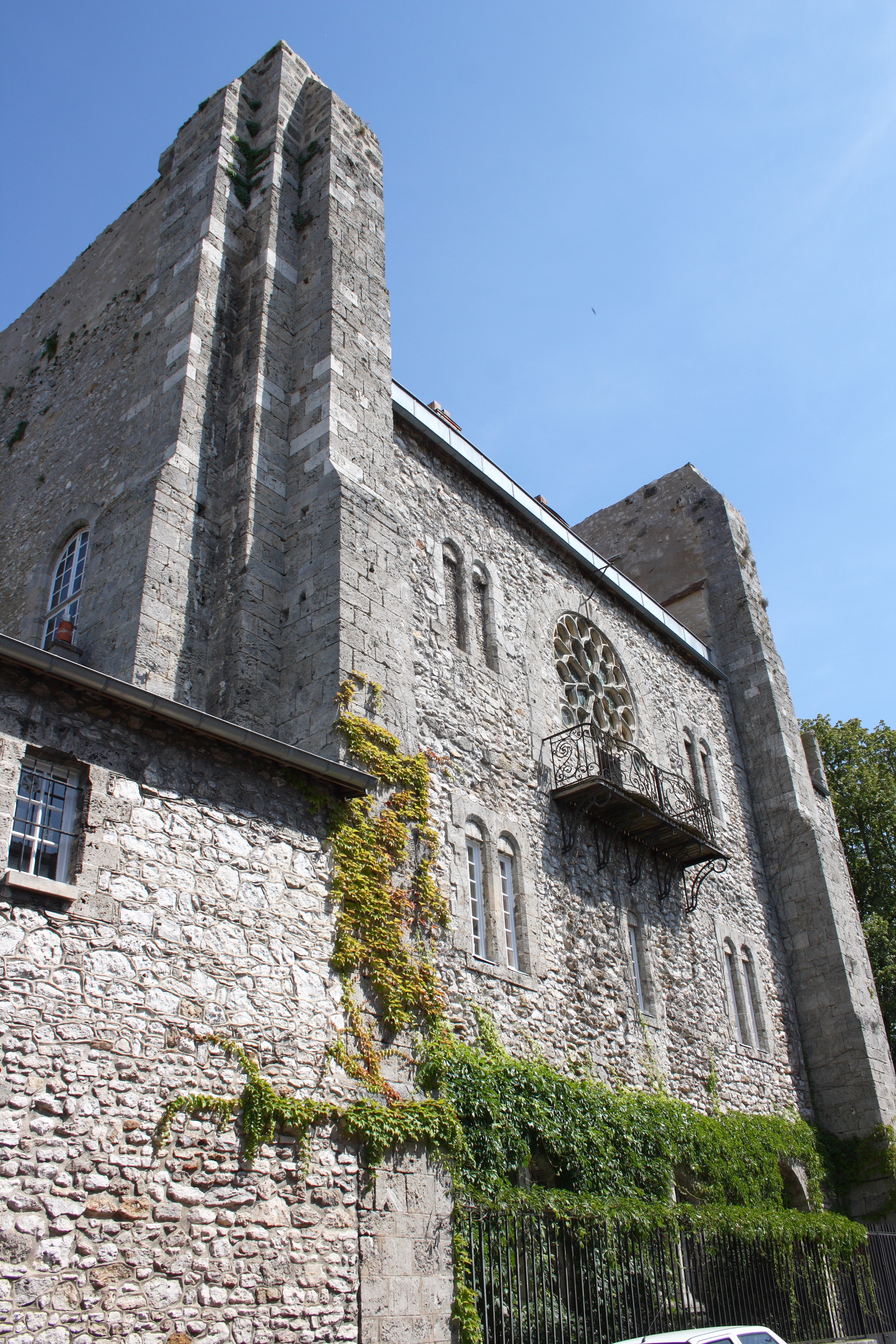 ehemaliges Schloss in Moret-sur-Loing im Département Seine-et-Marne (Île-de-France)